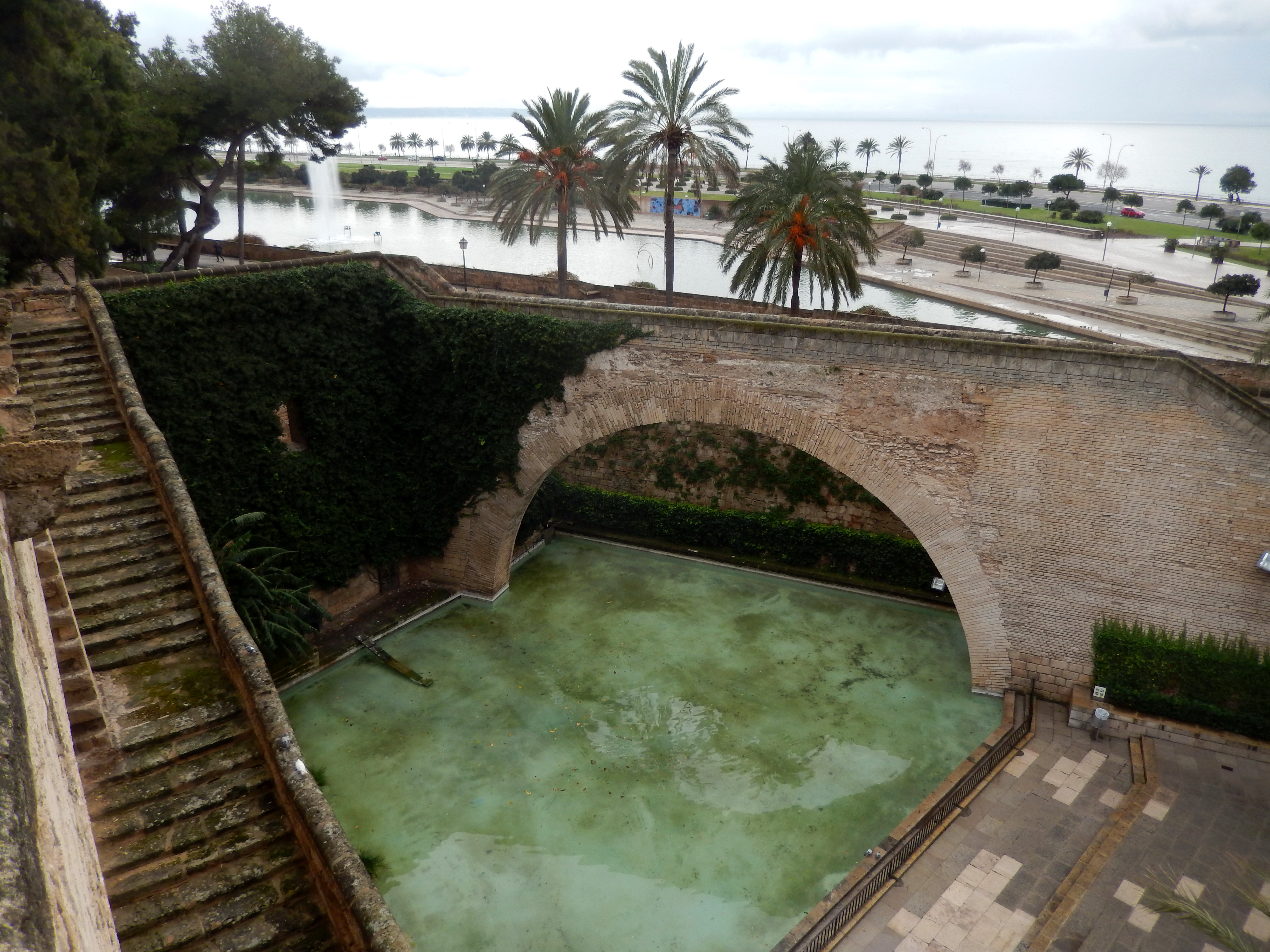 Palma de Mallorca